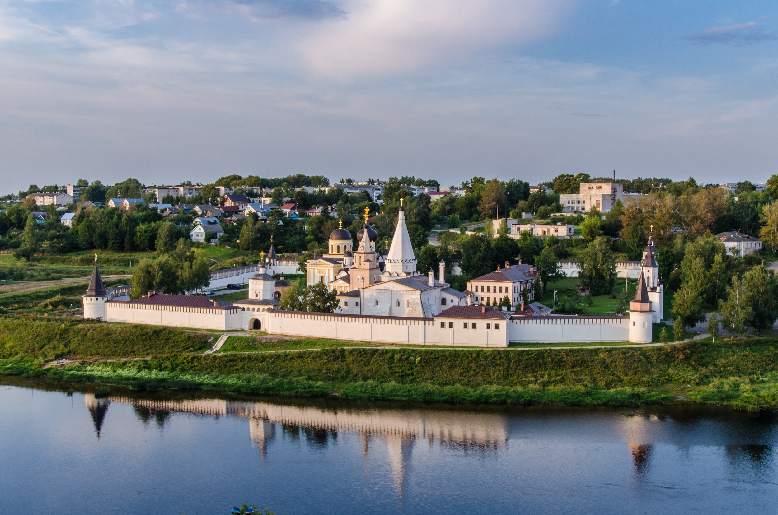 Монастырь Успенский: правый берег р.Волга, Старица, Старицкий район, Тверская область